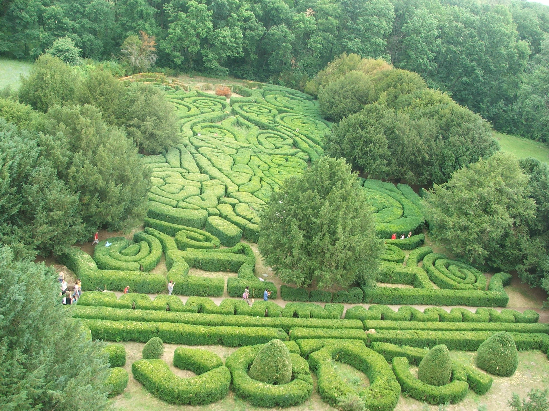 Tiszadob, Andrássy-kastély, sövénylabirintus